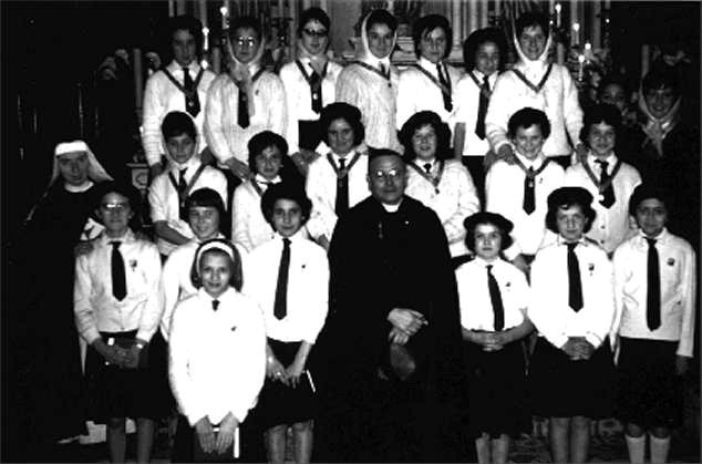 Cérémonie Réception Jeunes Cadettes de l'école des sœurs Trinitaires à Mascara le 8-12-1961.